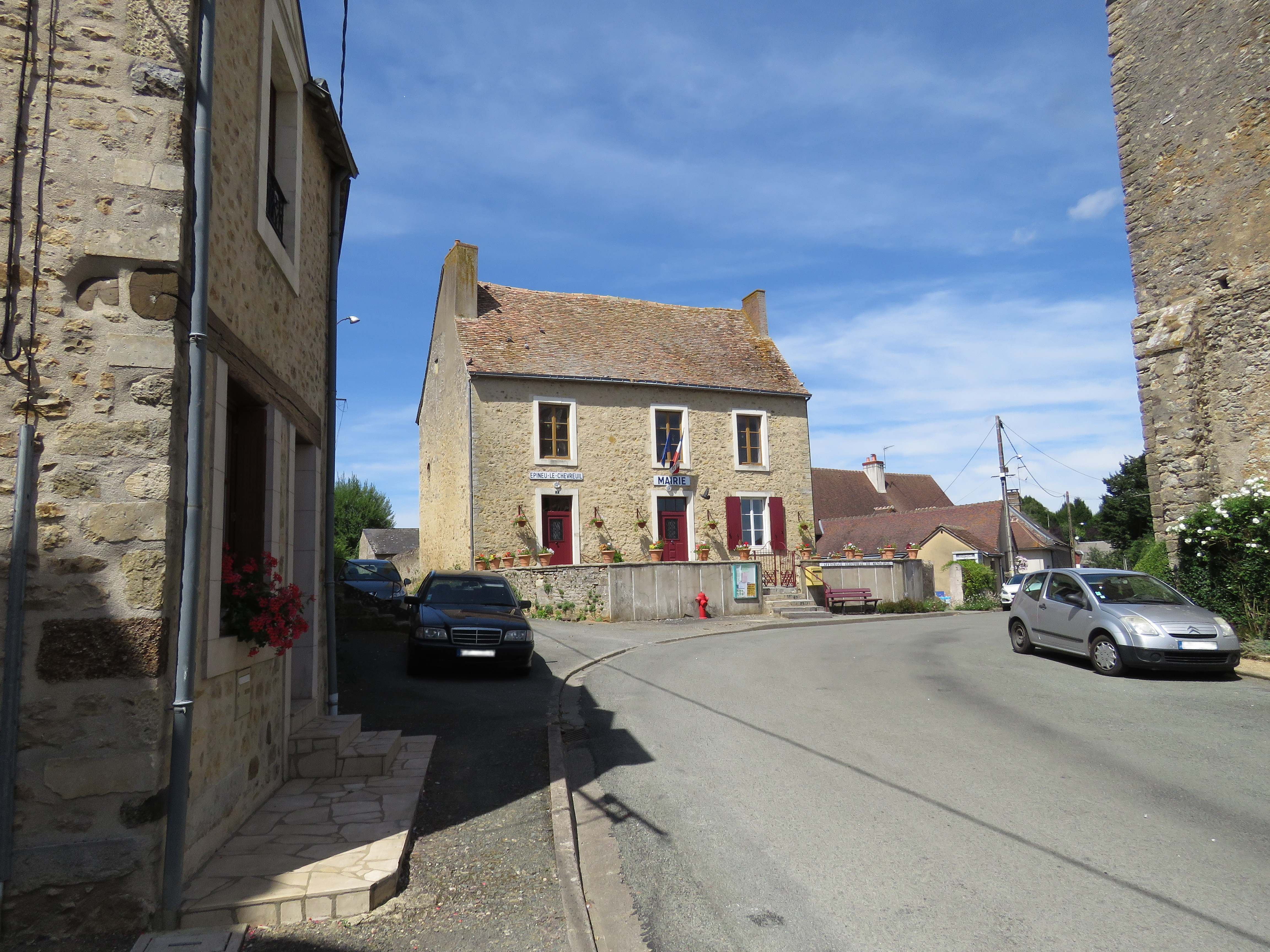 Mairie de ce charmant village